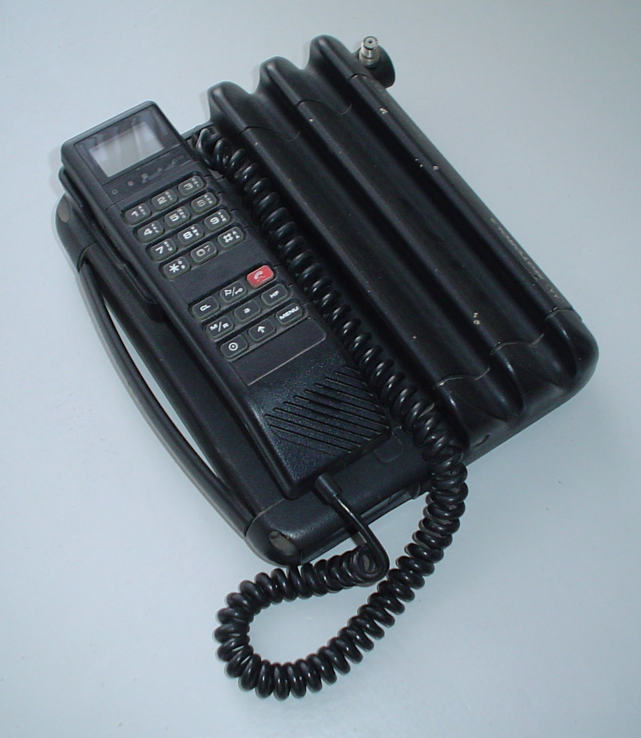 Poŝtelefono de Motorola el la komencaj tempoj